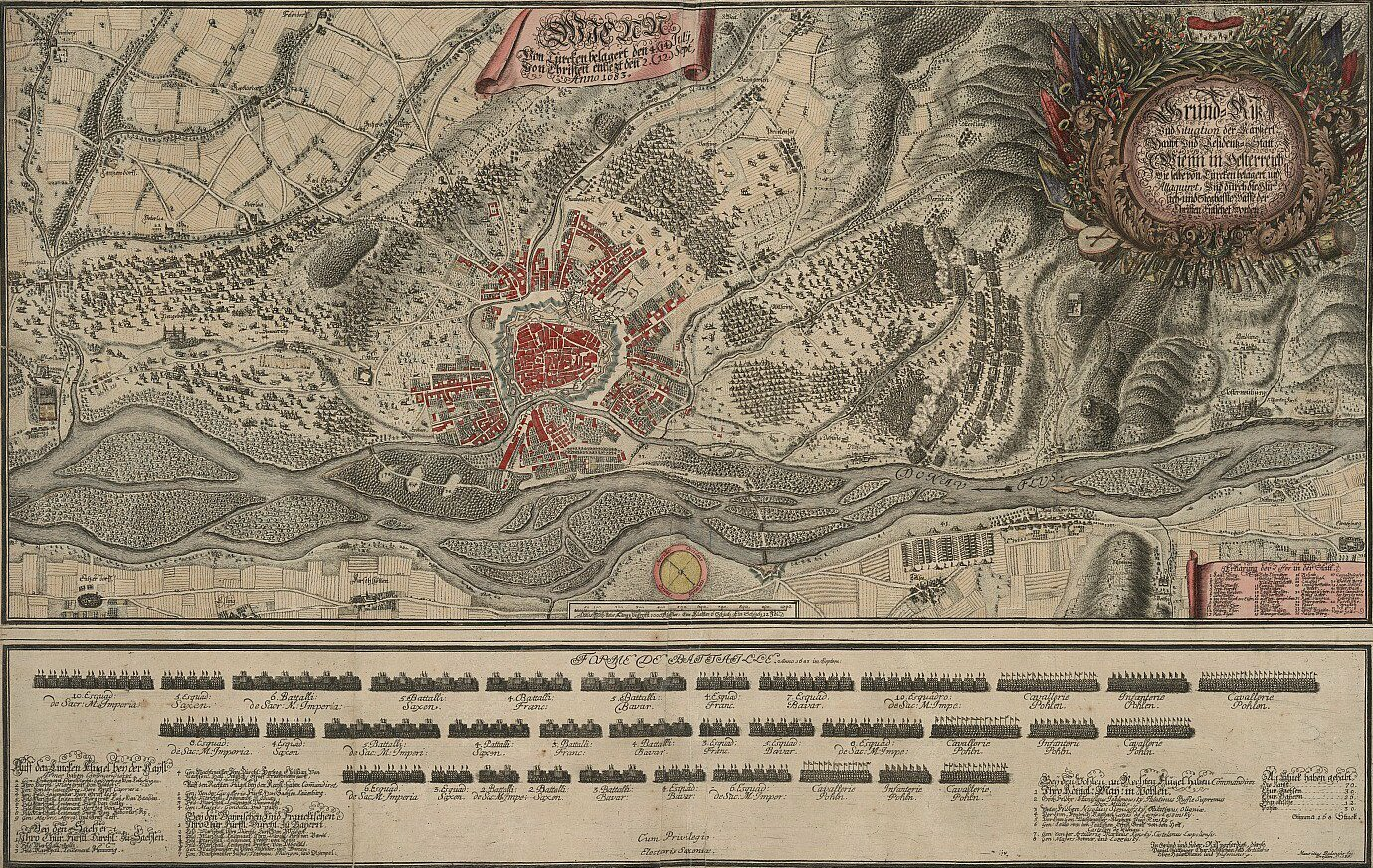 Topographisch genauen Darstellung von Wien und Umgebung, 1683.